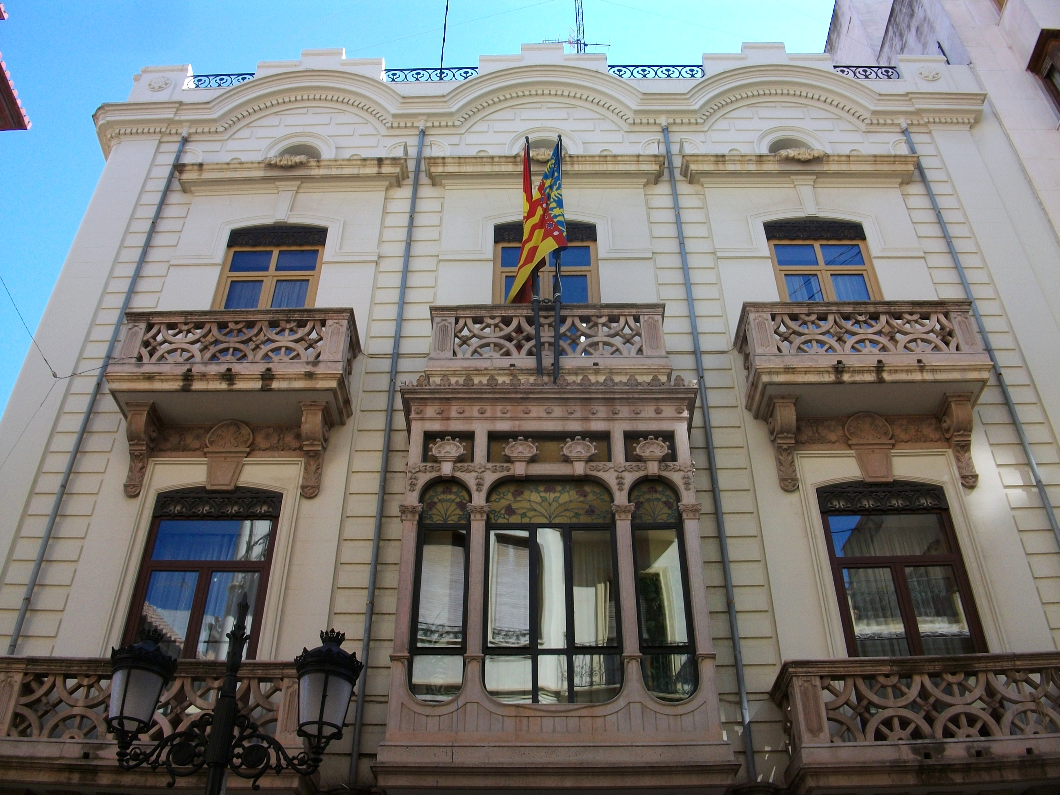 Casa dels Caragols de Castelló de la Plana.